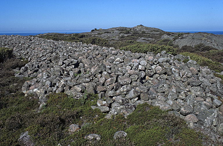 Långröse, RAÄ-nummer Onsala 82:1. Motiv: Onsala 82:1 Nyckelord: Flygbilder, Naturreservat, Riksintressen Kategori: Röse, Kust- och skärgårdsmiljö Långröse, RAÄ-nummer Onsala 82:1. Onsala 82:1.